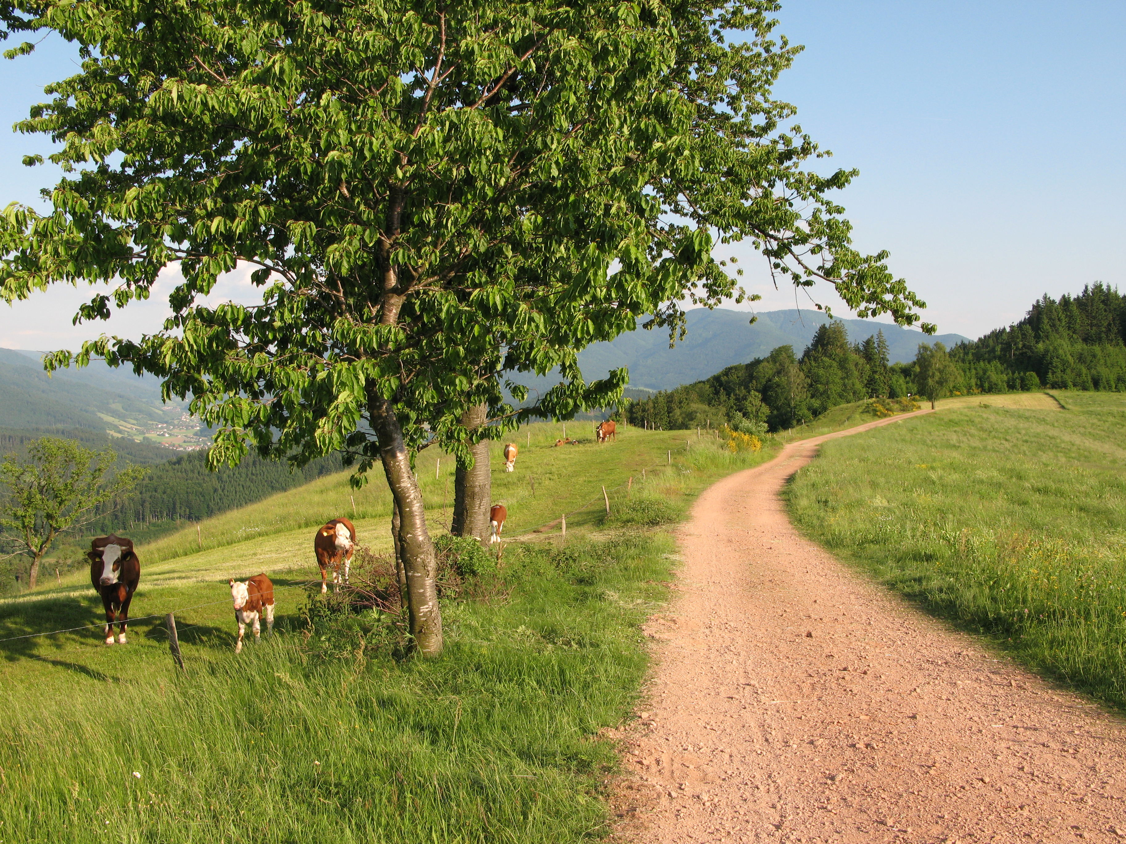 Am Eckleberg auf dem Zweitälersteig und dem Kandelhöhenweg mit Blick in das Simonswäldertal und den Kandel